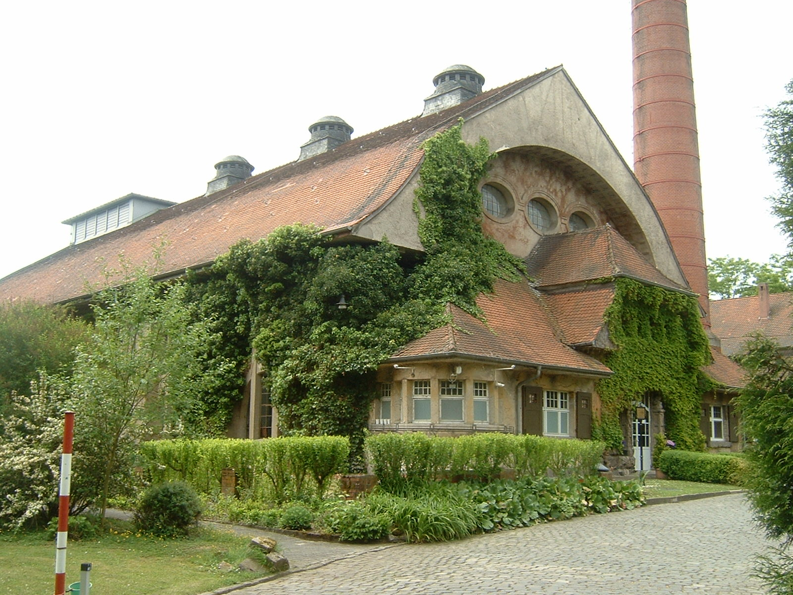 Wasserwerk in Hattersheim am Main, erbaut 1905/1909, Jugendstil